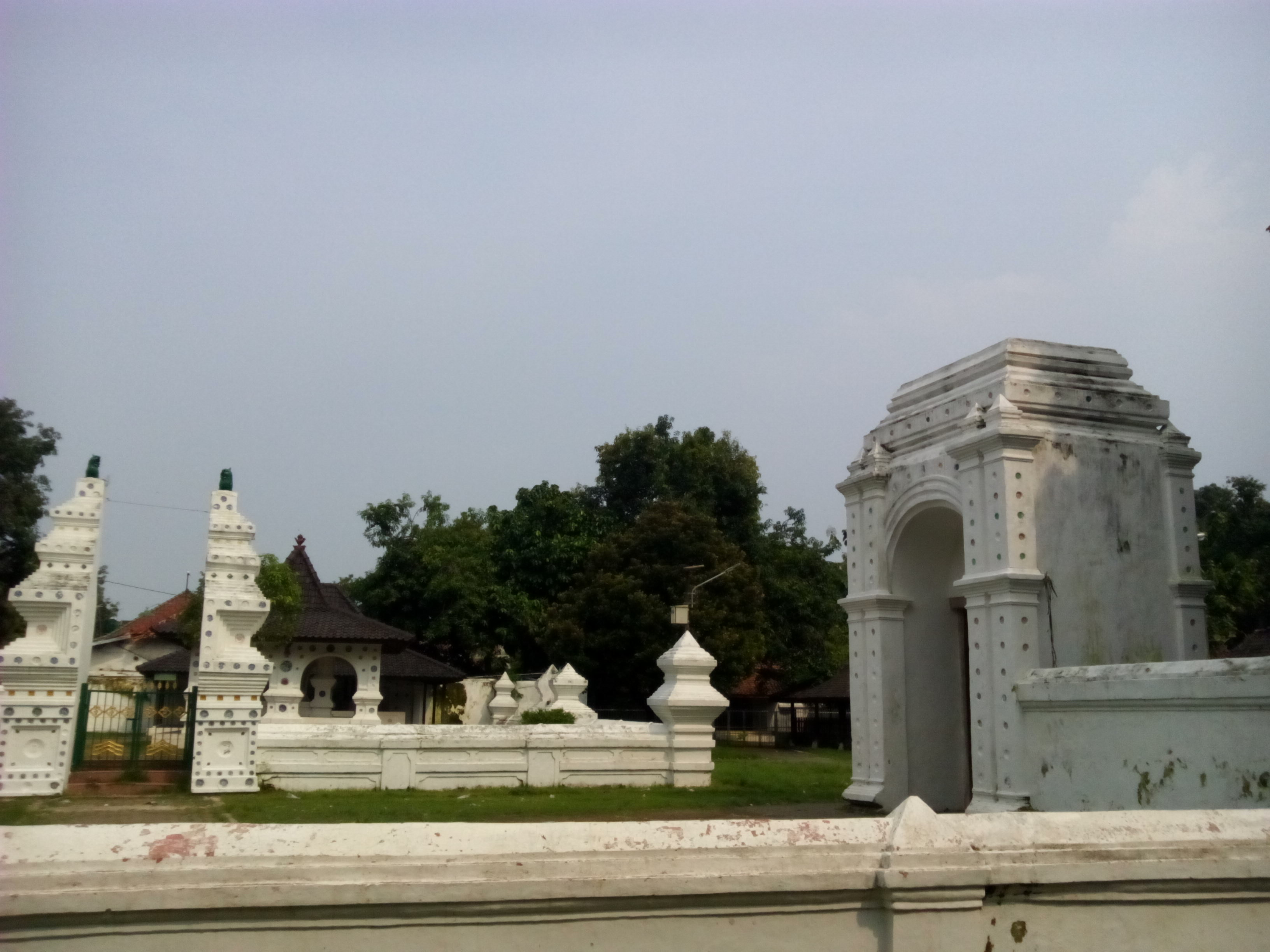 Komplek Keraton Kanoman Kota Cirebon, Provinsi Jawa Barat, Indonesia